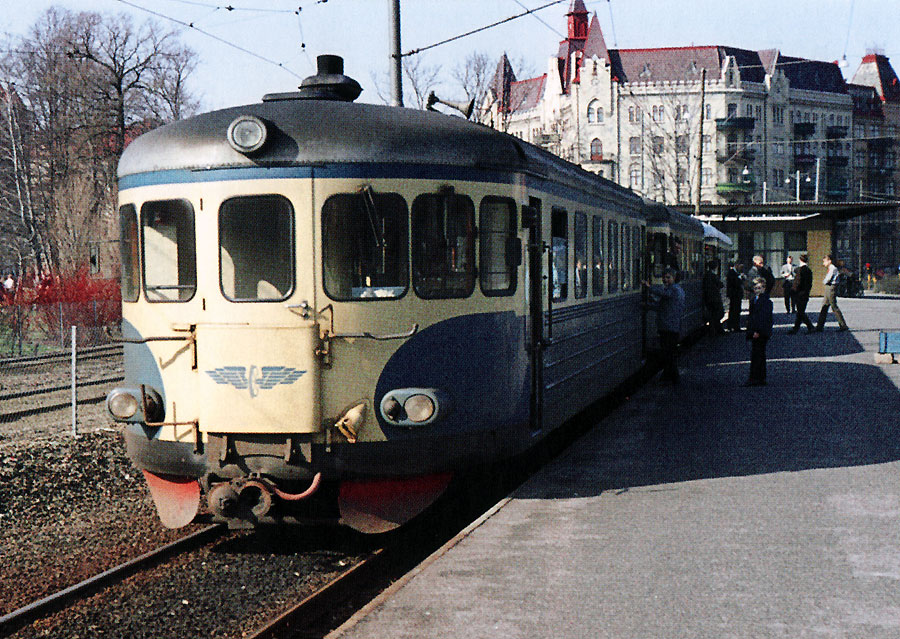 Säröbanans station, Göteborg